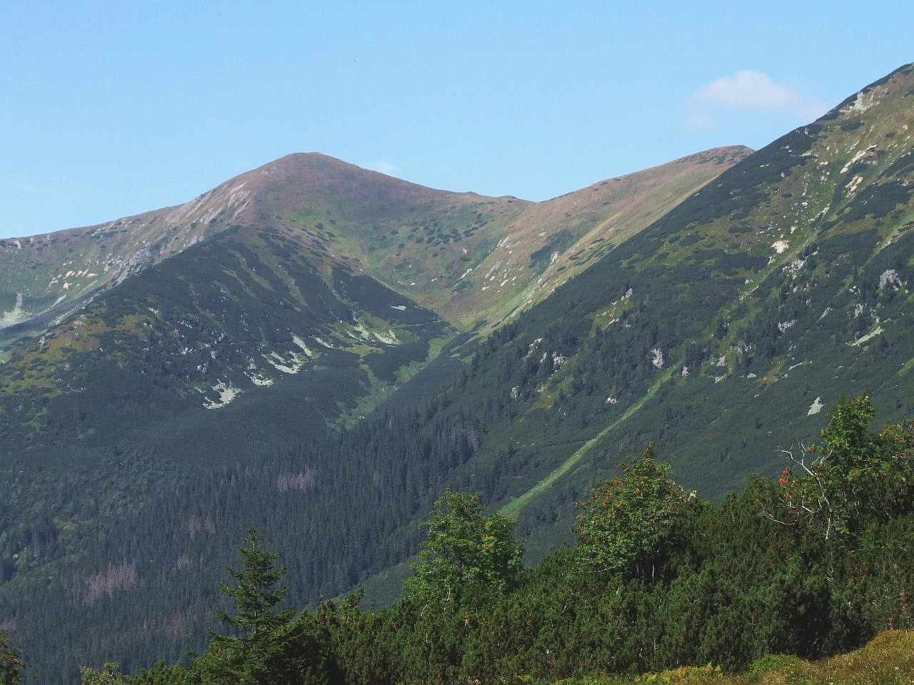 U góry: Wielka Kopa Koprowa, Wyznia Garojowa Przełęcz i Wielka Garajowa Kopa. między nimi Dolina Garajowa. Widpk z Doliny Hlińskiej